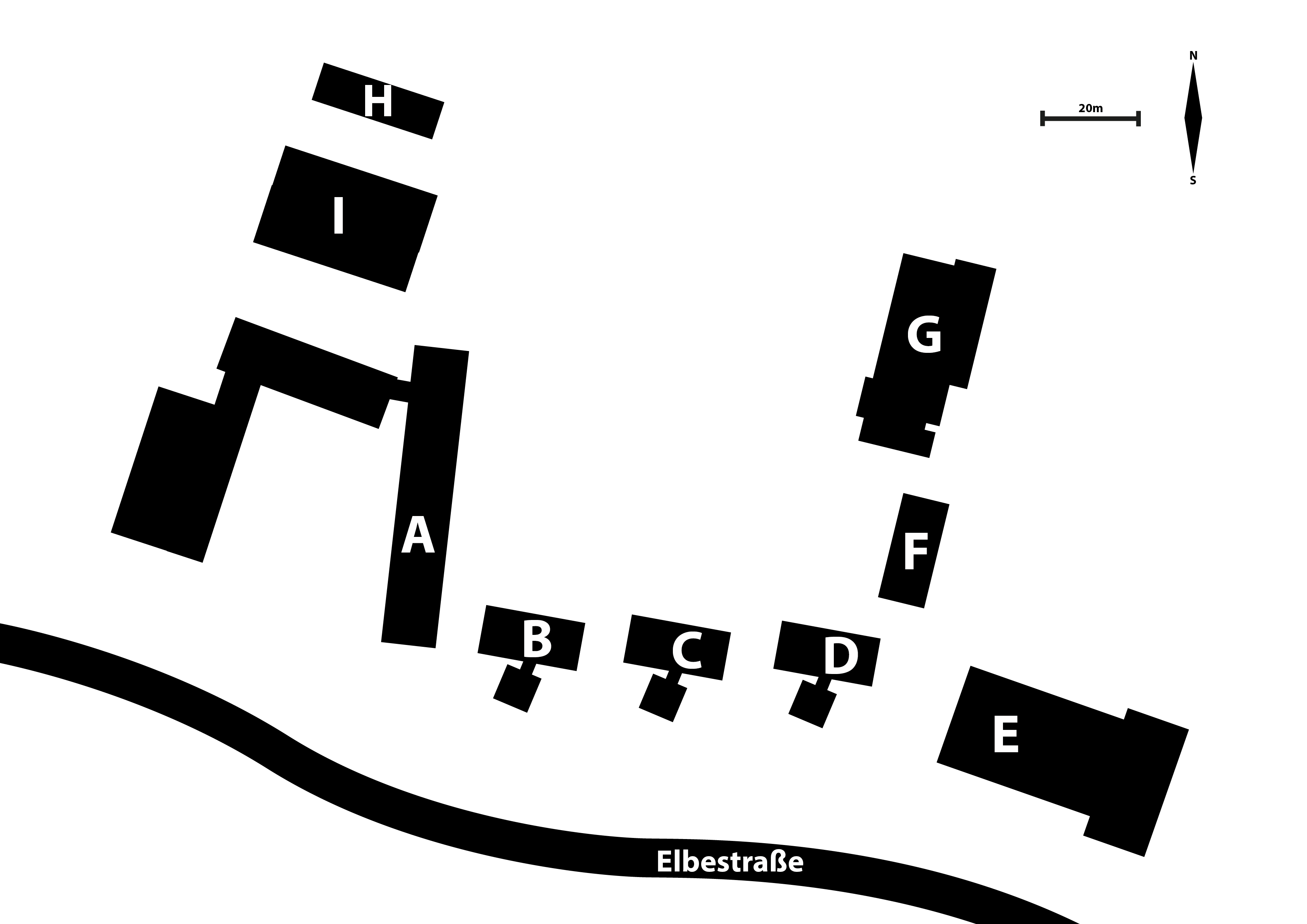 Lageplan der Fridtjof Nansen Schule mit Gebäudebezeichnungen (Buchstaben)